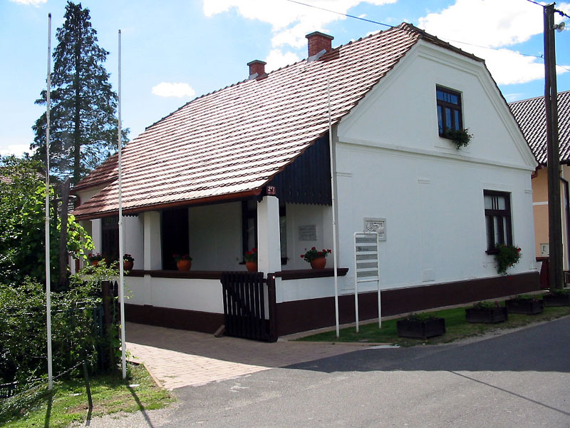 Miško Kranjec szlovén író szülőháza Nagypalinán (Velika Polana)